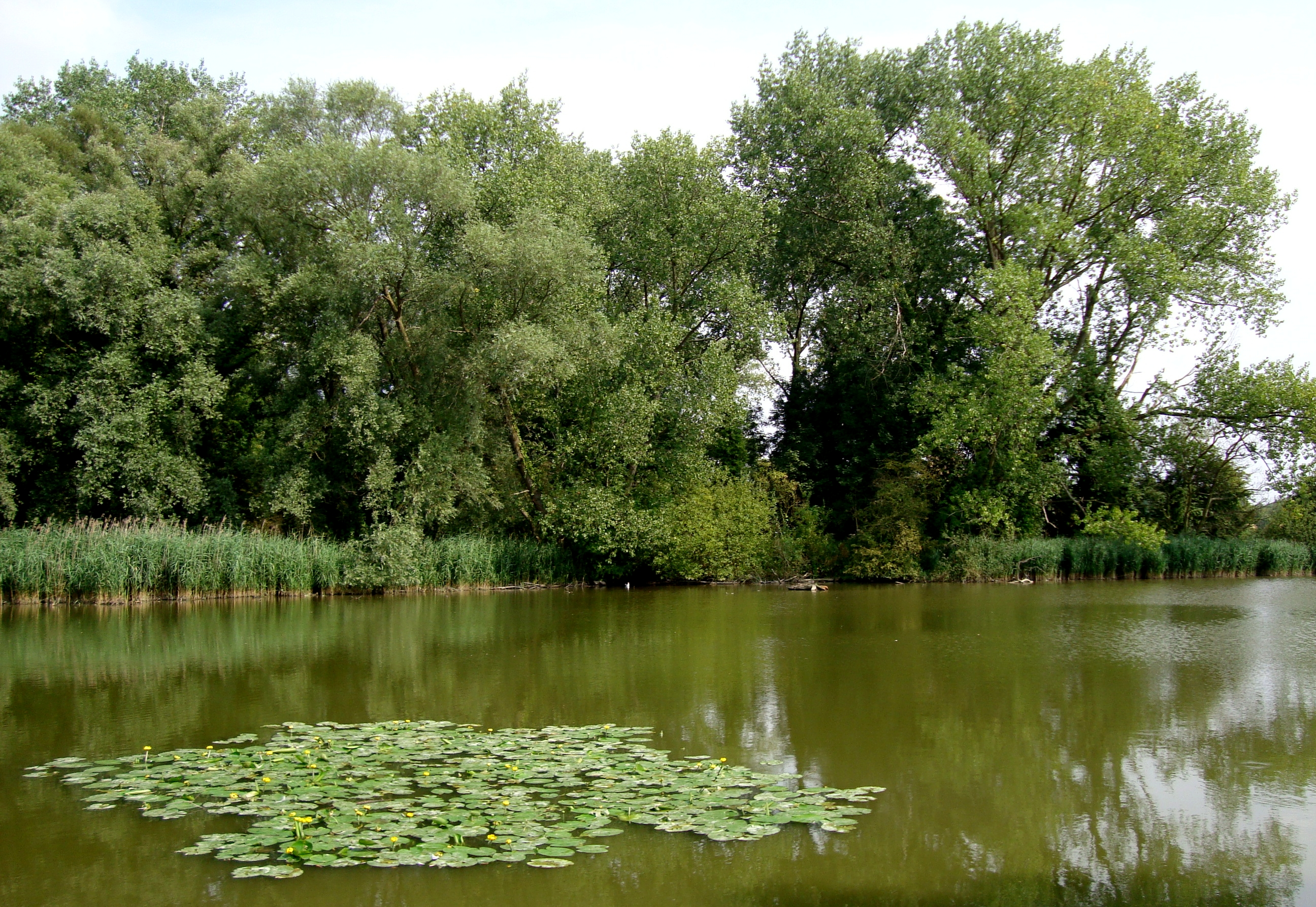 Le marais dans le parc de la Deûle à Wavrin (Nord).